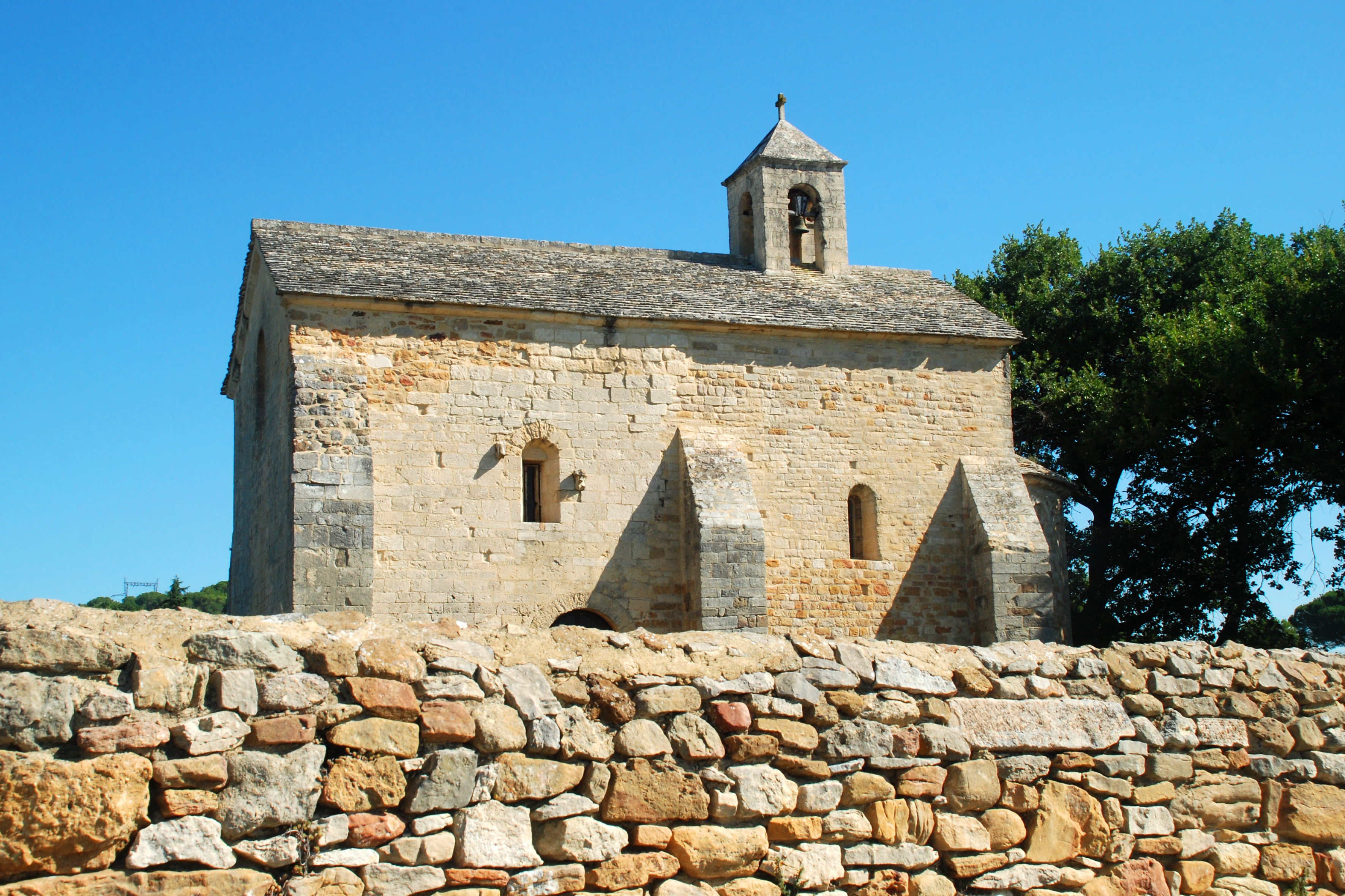 France - Gard - Tresques - Église Saint-Martin-de-Jussan .